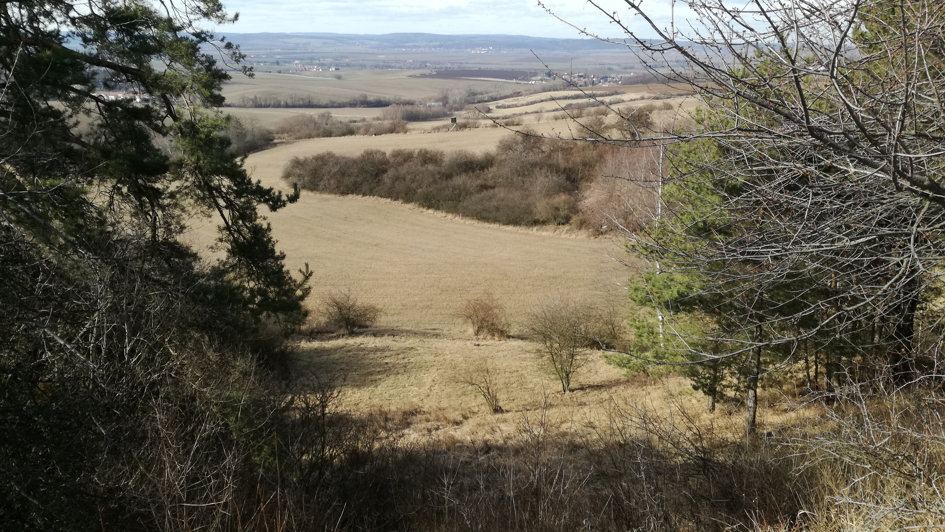 PP Roznitál